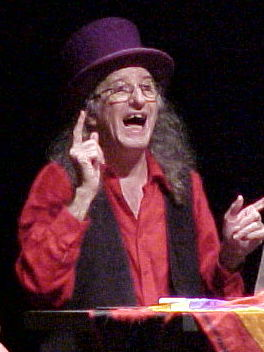 Juan Tamariz durante su actuación en Puerto del Rosario, Fuerteventura el 12/12/2001